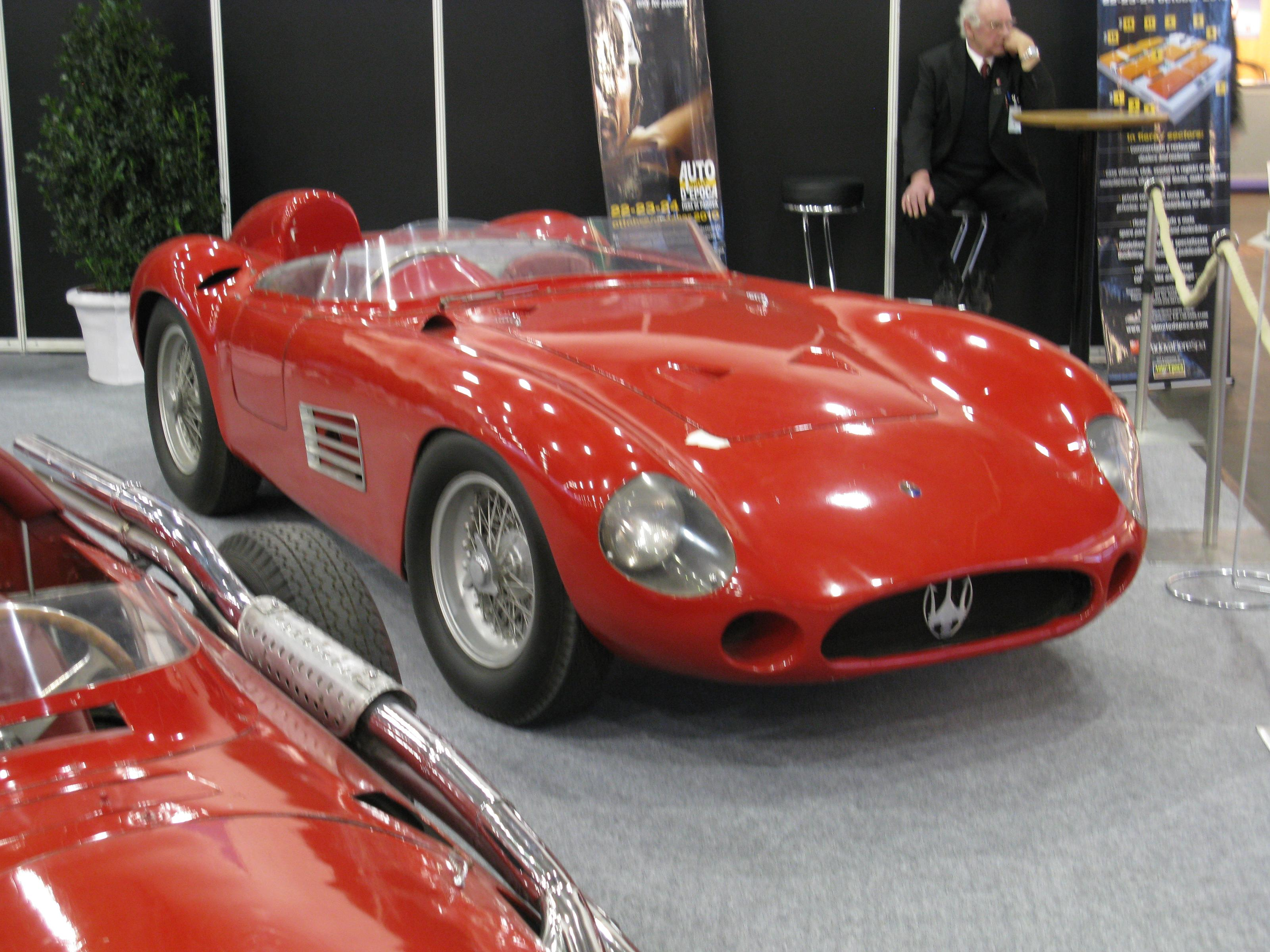 Maserati 300 S